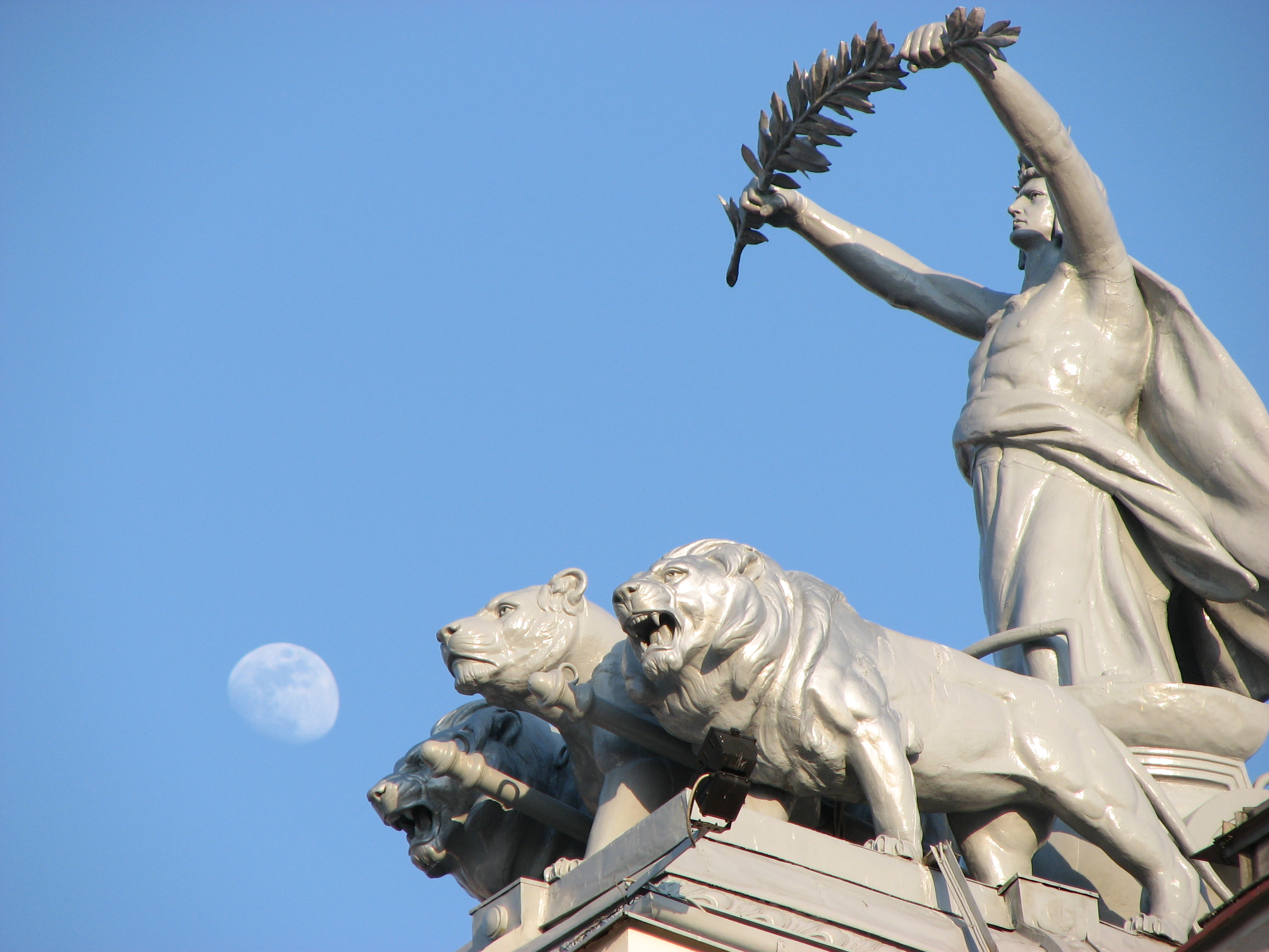 Apus de Soare si rasarit de Luna.